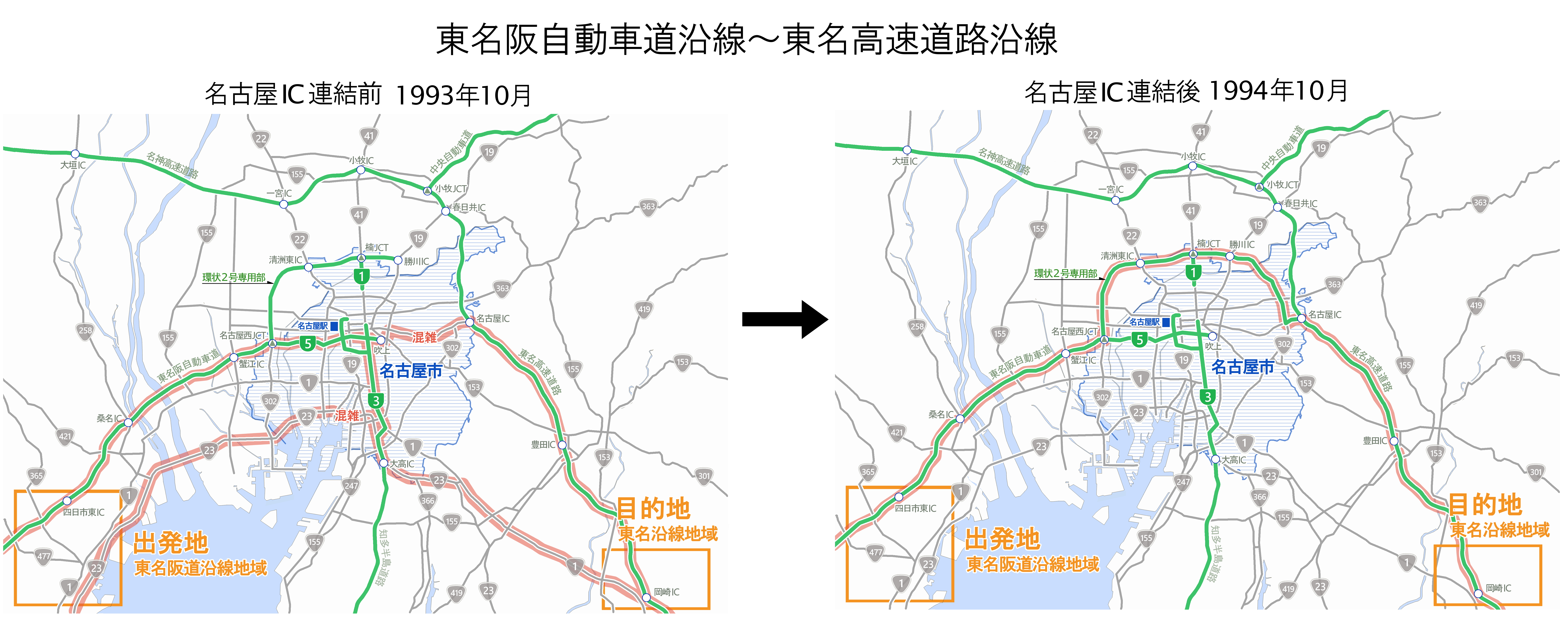 名古屋環状2号線専用部、名古屋IC-勝川IC間開通前後の影響分析。東名阪道沿線と東名高速沿線間の交通流動。図中の都市高速のナンバリングは便宜的に1995年9月以降の基準で表示した。図典拠：『高速道路と自動車』第38巻第11号、1995年11月、31-36頁